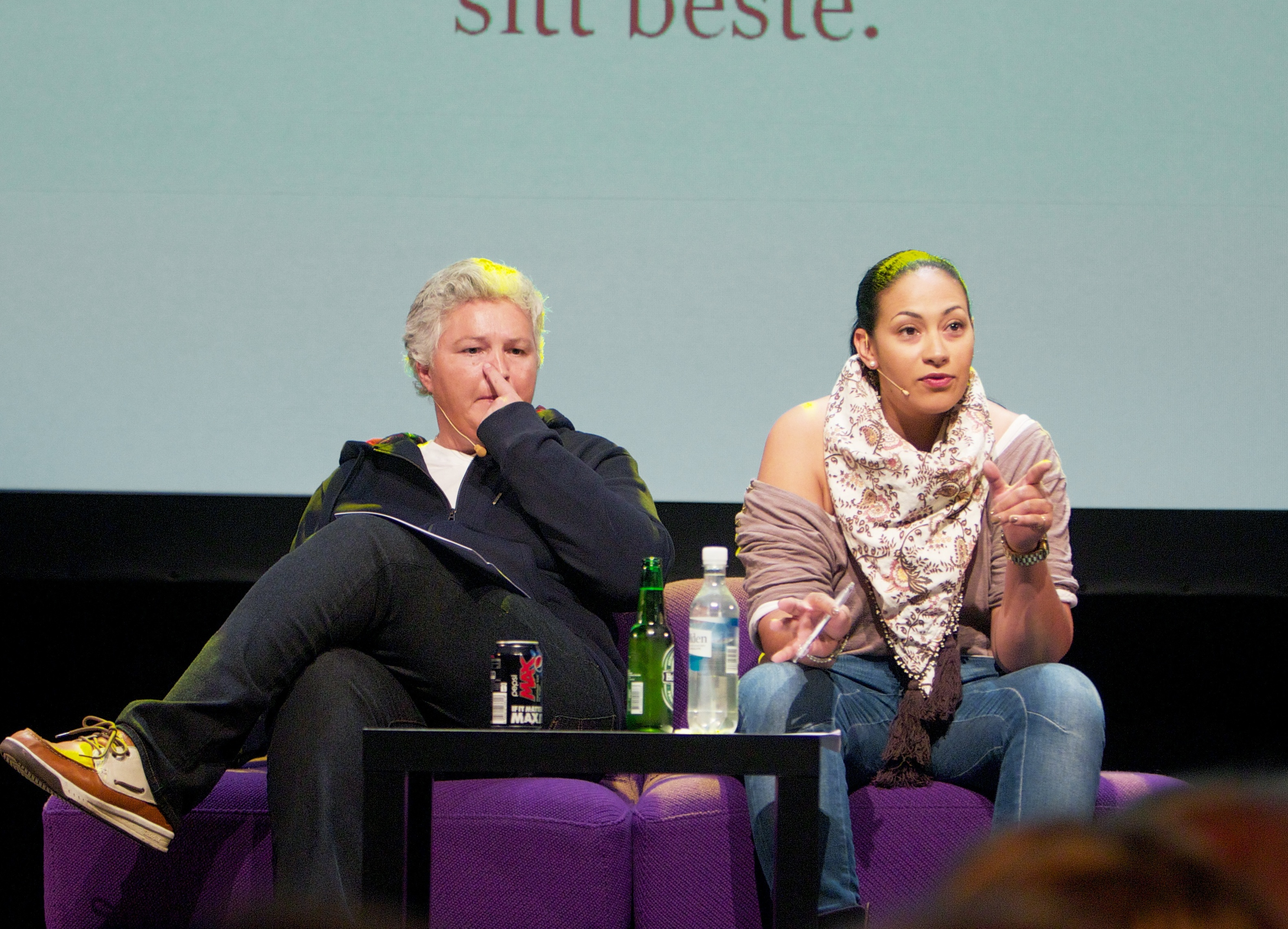 Den store mediequizen med Sarah Natasha Melbye og Brita Cappelen Møystad .